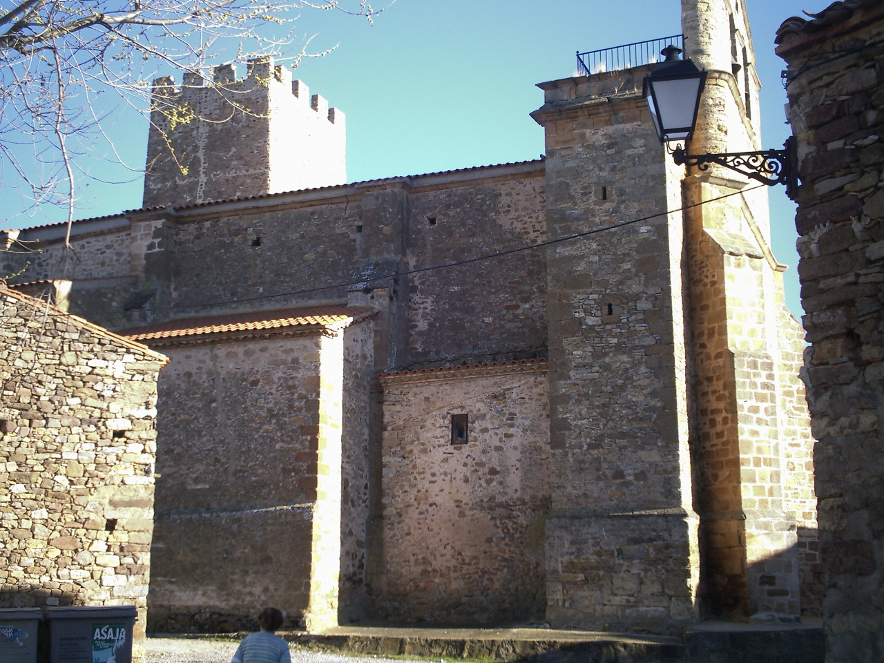 Iglesia Parroquial de Nuestra Señora de la Asunción o de la Virgen del Río Manzano. Trébago - Soria (España)